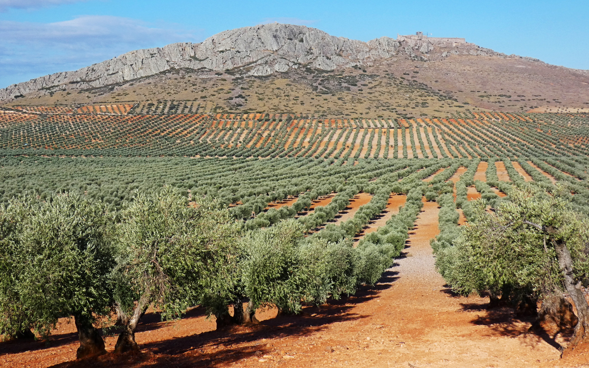 Vista desde el este de la sierra del Castillo, con el castillo de Peñas Negras a la derecha.